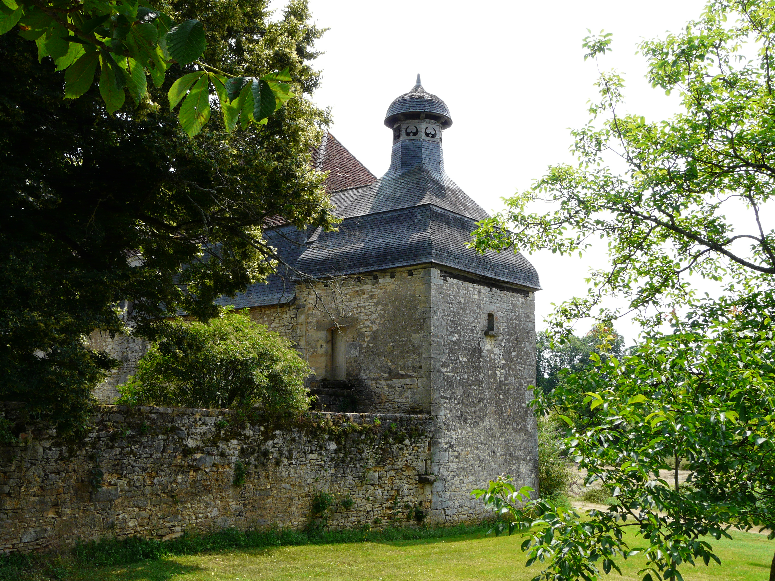 Le pigeonnier à l'angle sud-ouest du château des Charreaux, Hautefort, Dordogne, France.